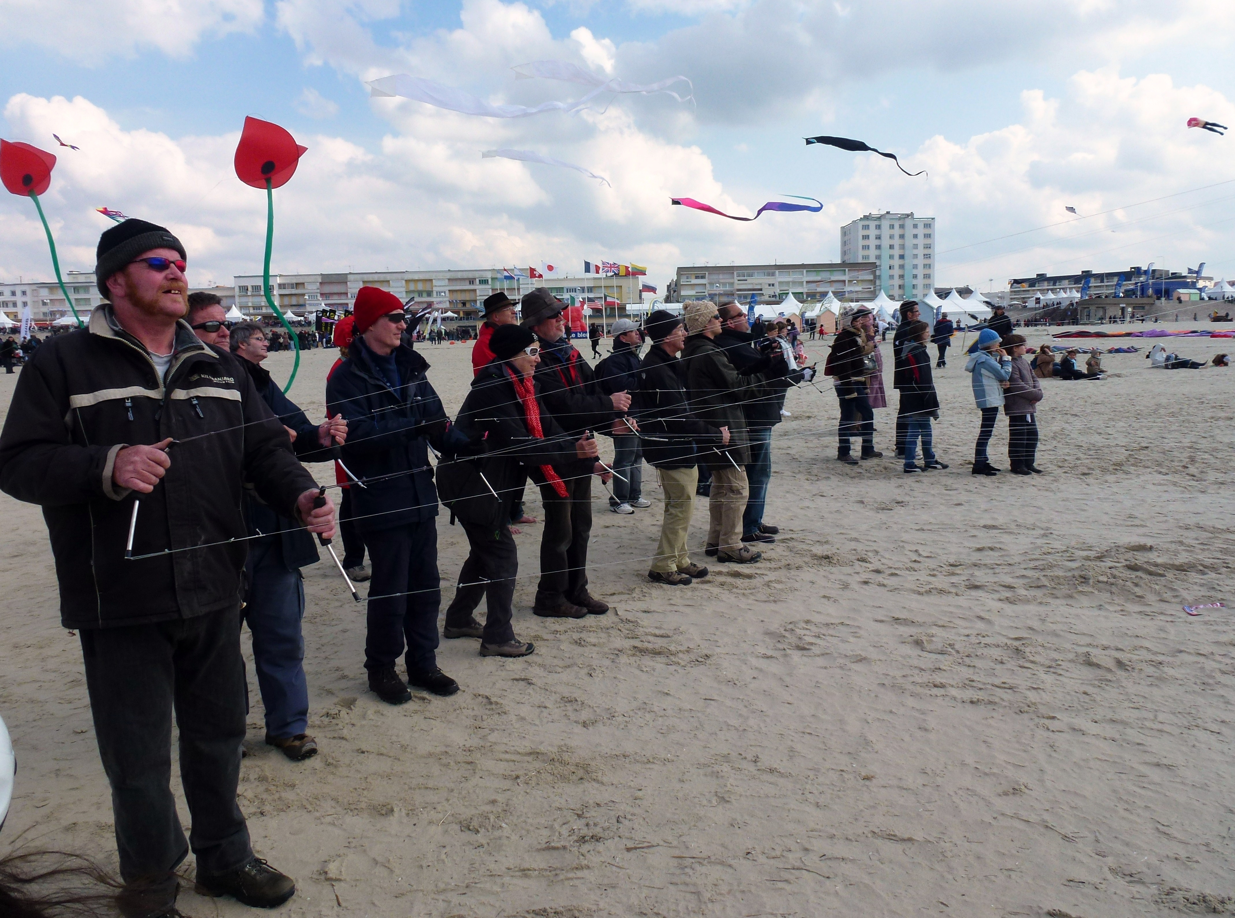 L'équipe "Cerfs-Volants Folie" (vice-champione de France et 3ème à la coupe d'Europe en 2013), lors de la 26ème rencontre internationale des Cerfs-volants de 2012 à Berck (Pas-de-Calais), Pas-de-Calais, Nord-Pas-de-Calais-Picardie France.